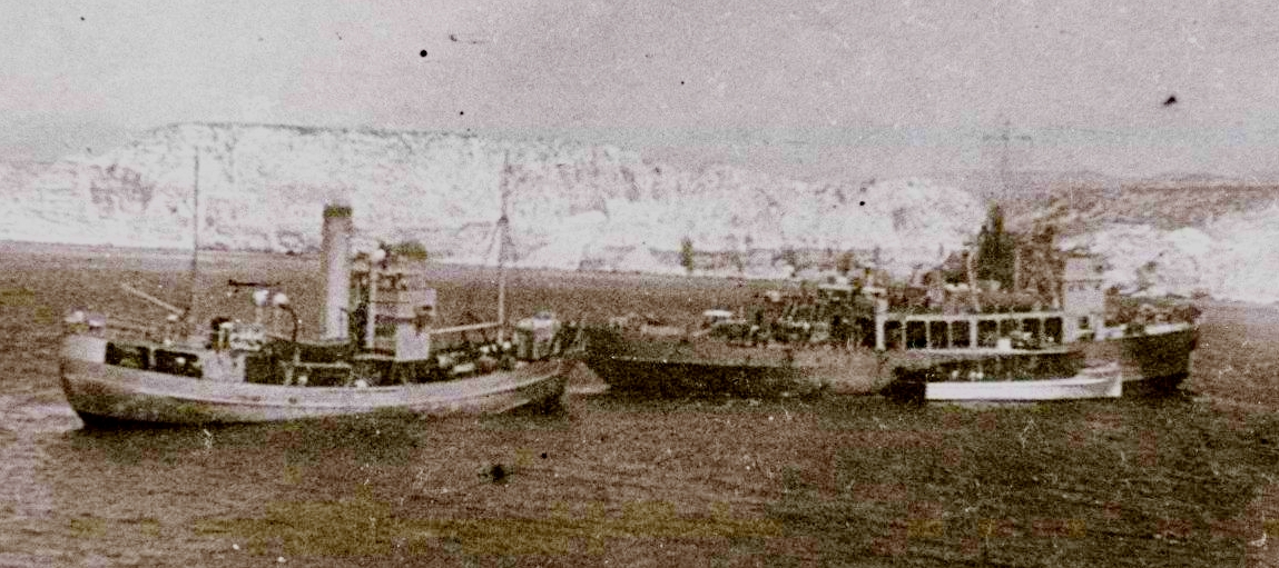 אח"י אילת (א-16) ואח"י דרום אפריקה במפגש בקרבת כרתים 1950